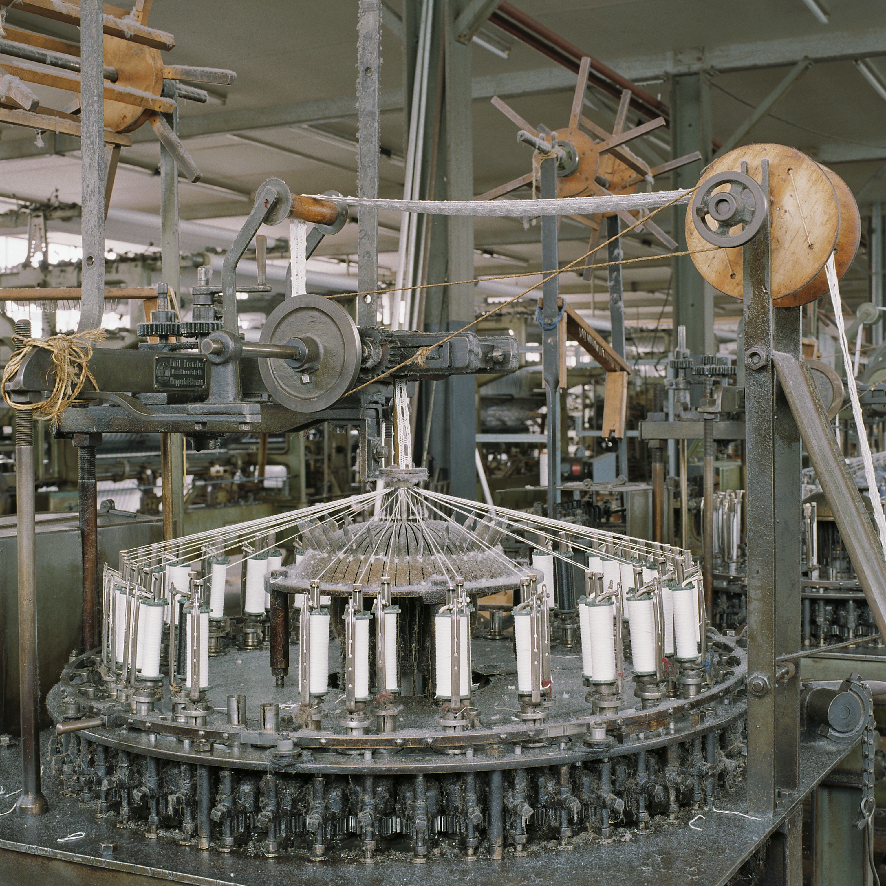 Zuid-Nederlandse Kantfabriek: Interieur productiehal, ... (opmerking: Voorste twee panden zijn van een voormalige sigarenfabriek)